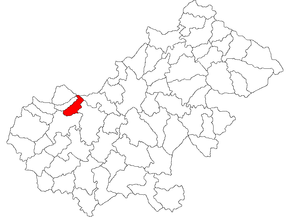 Categorie:Hărţi ale judeţului Satu Mare